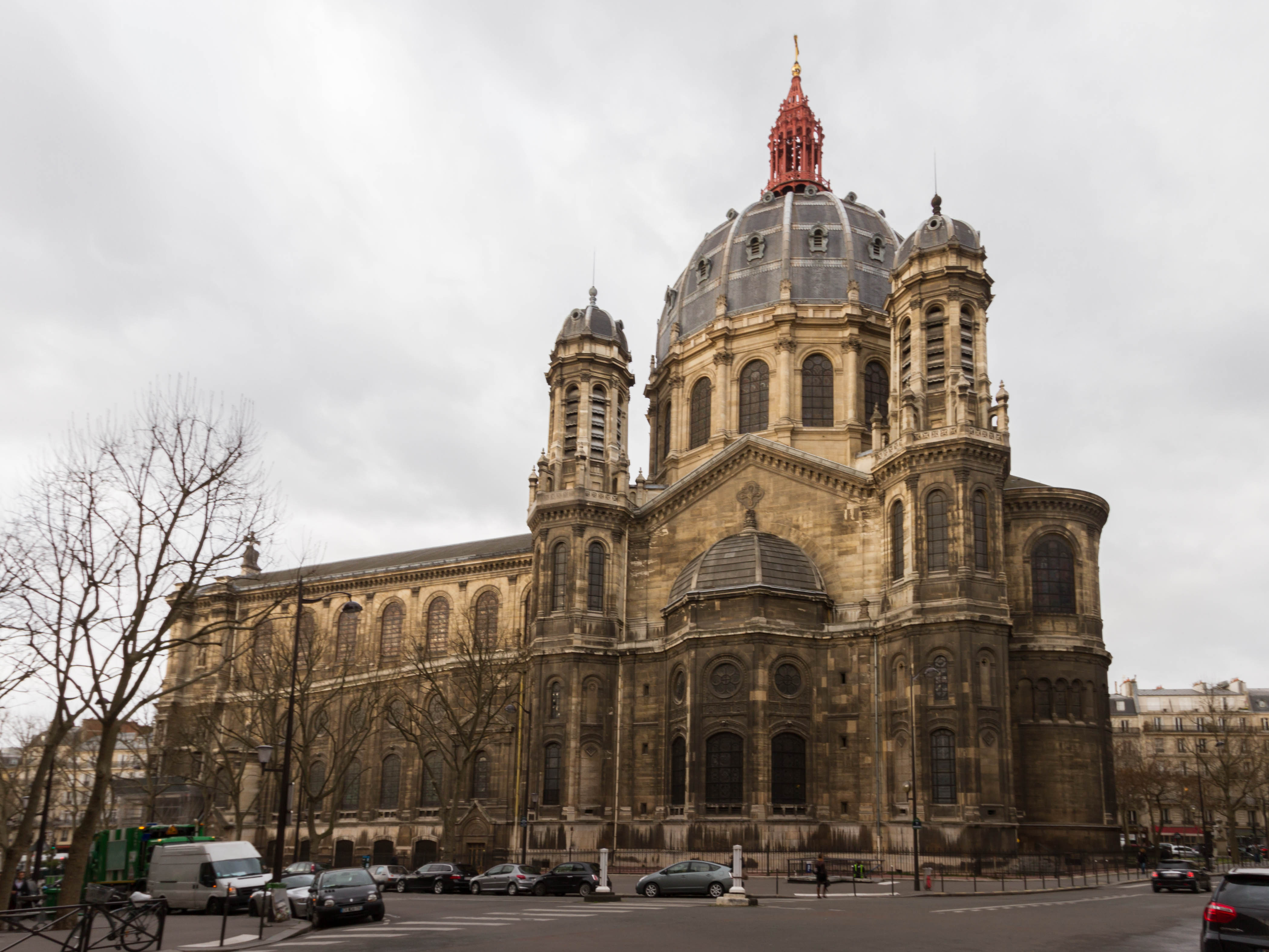 Église Saint-Augustin de Paris depuis la rue de Vienne